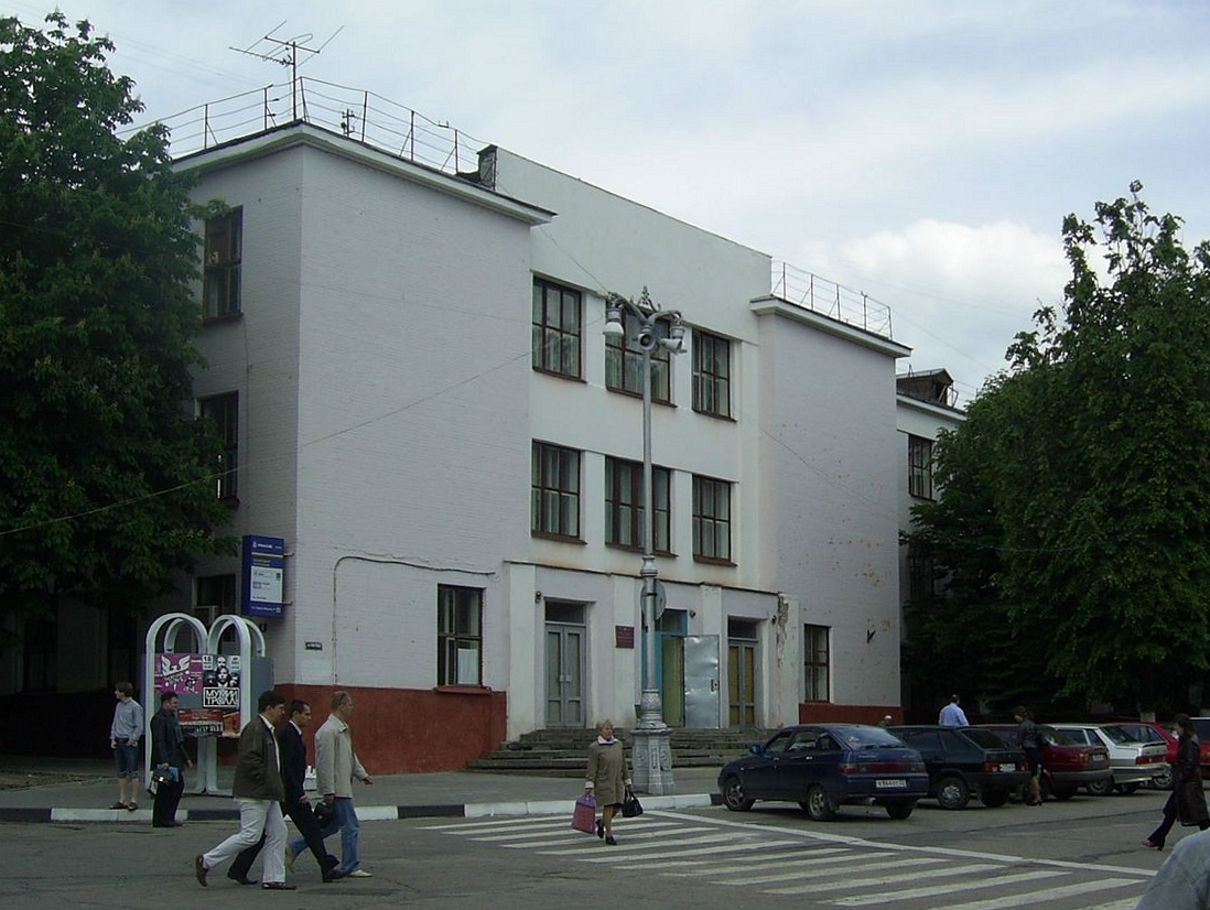 Брянск, площадь Карла Маркса (Красная пл.). Старый корпус поликлиники